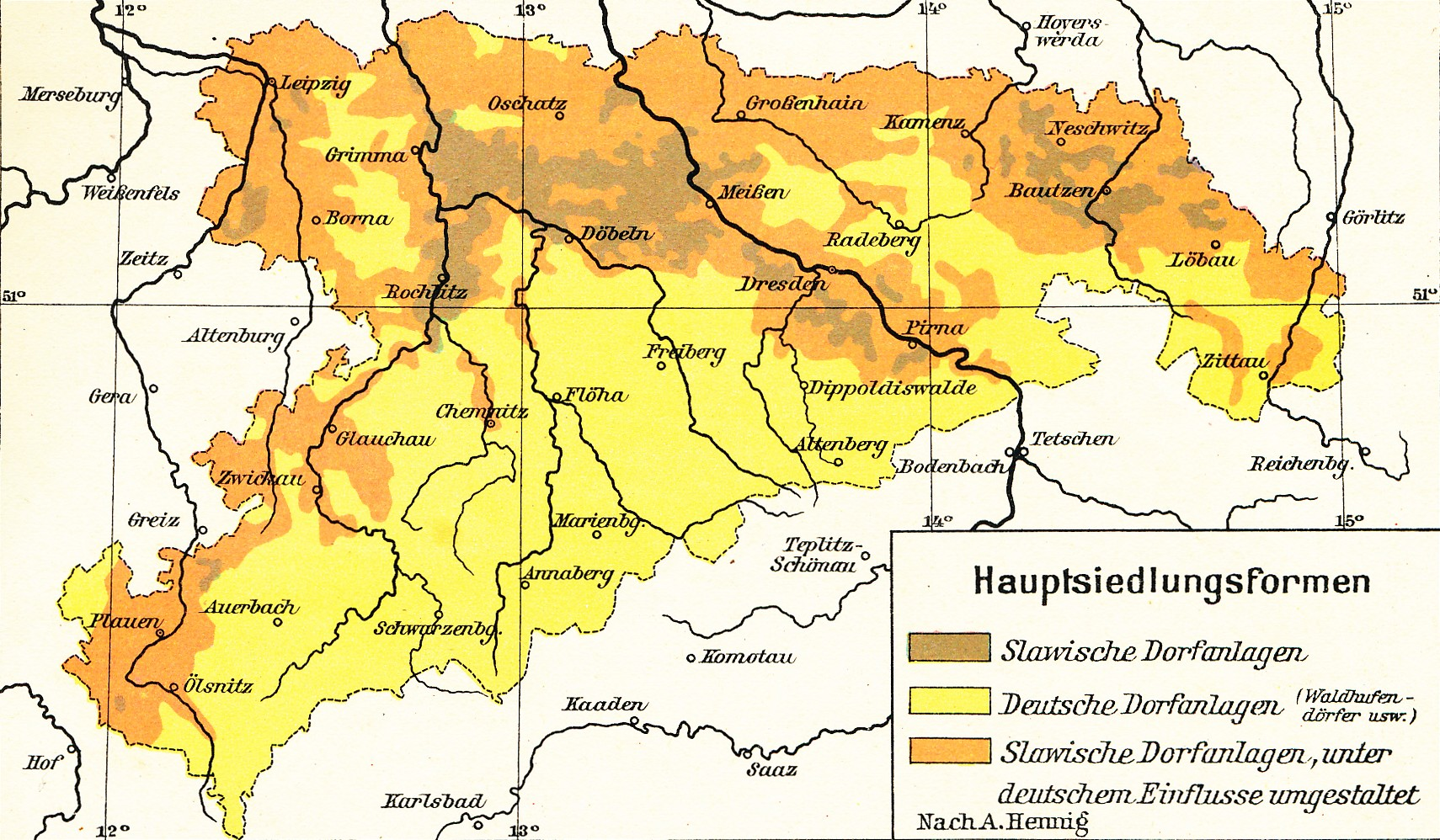 Freistaat Sachsen, Hauptsiedlungsformen This is a part of an old atlas. It does not represent the current situation.